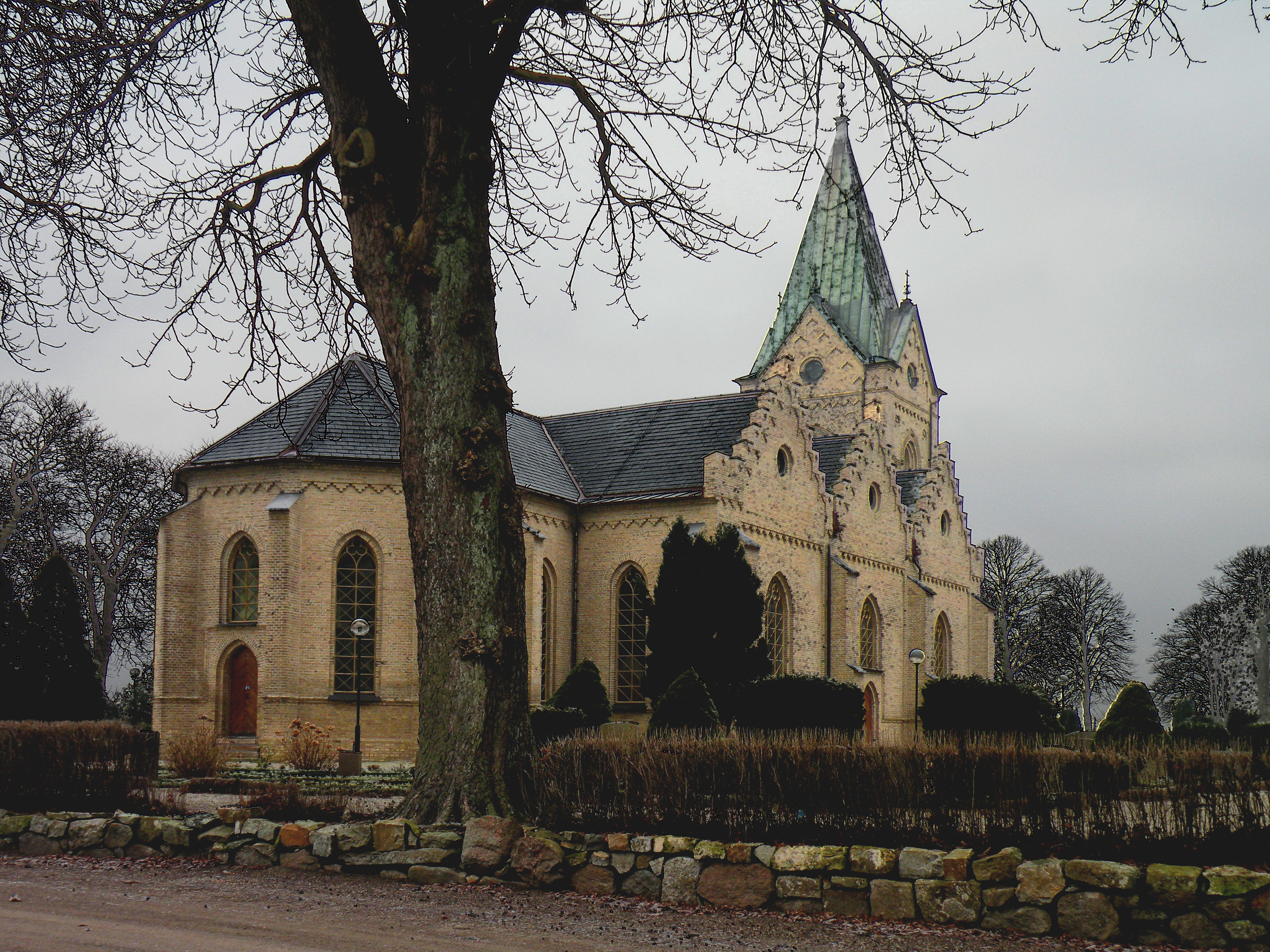 Church in Upäkra.("Lund before Lund")